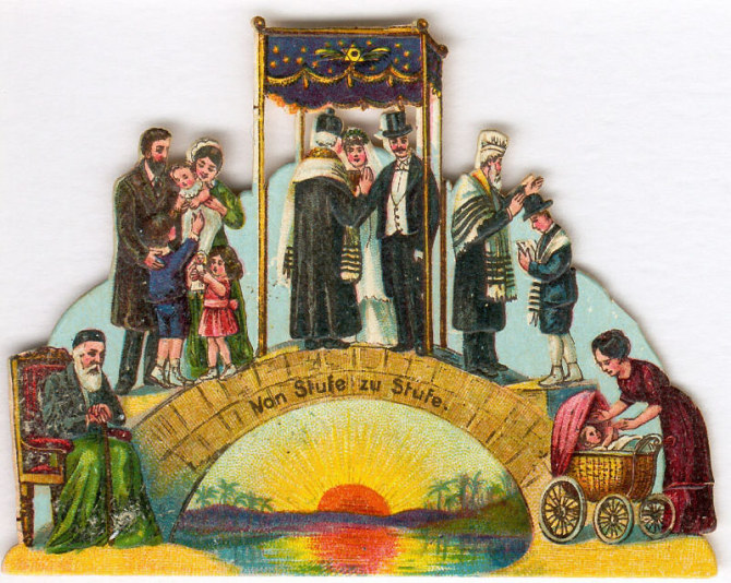 Lebenstreppe (jüdische Oblate, 1905/10). Chromolithographie